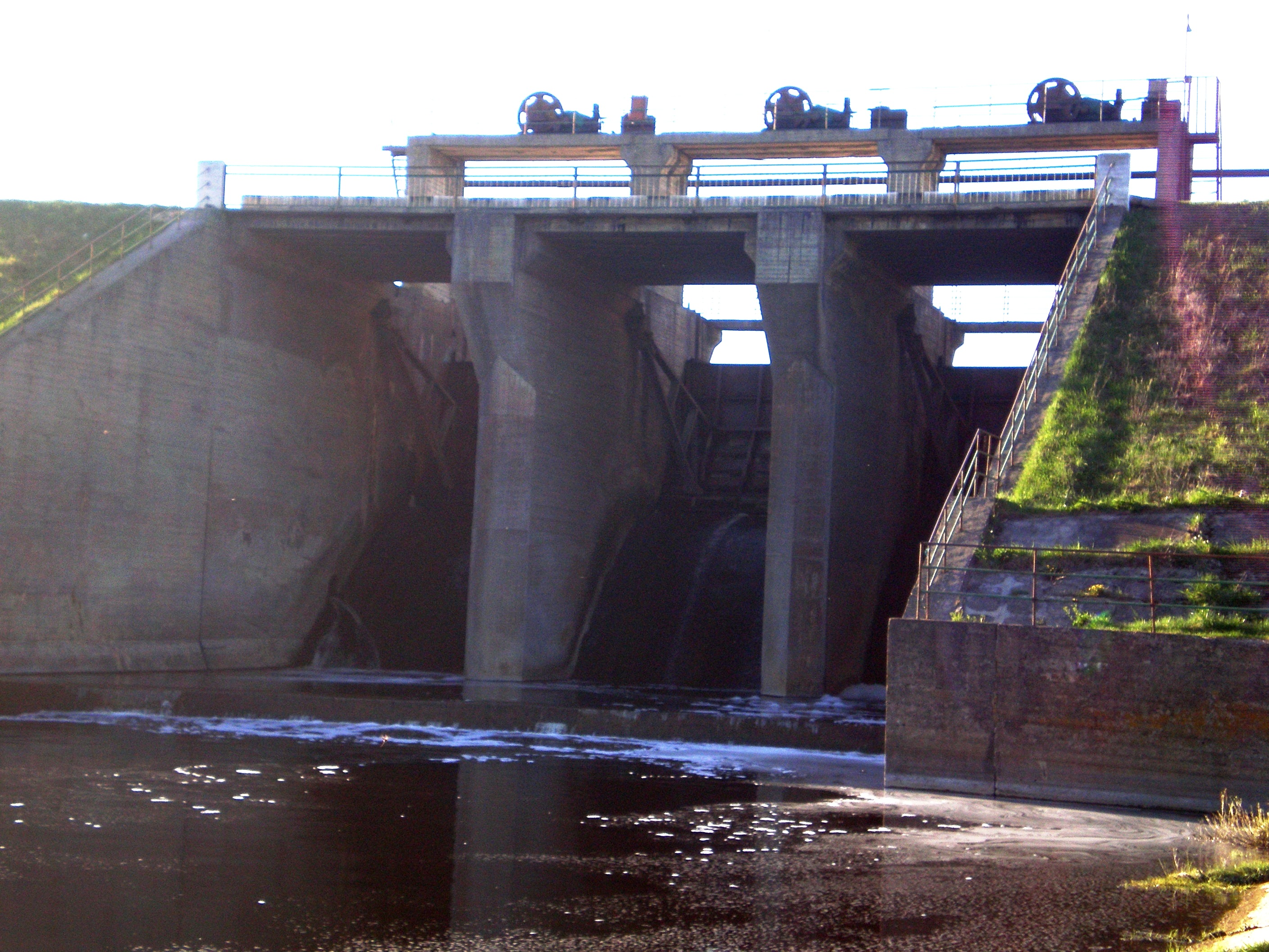 Vaitiekūnų tvenkinio užtvanka, Radviliškio raj.